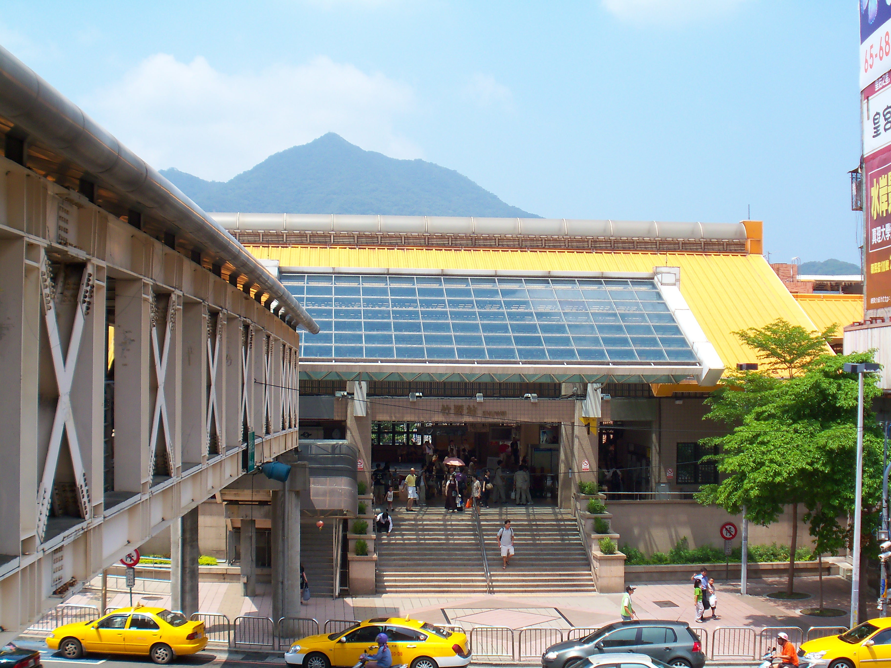 台北捷運淡水線竹囲駅1号出口。